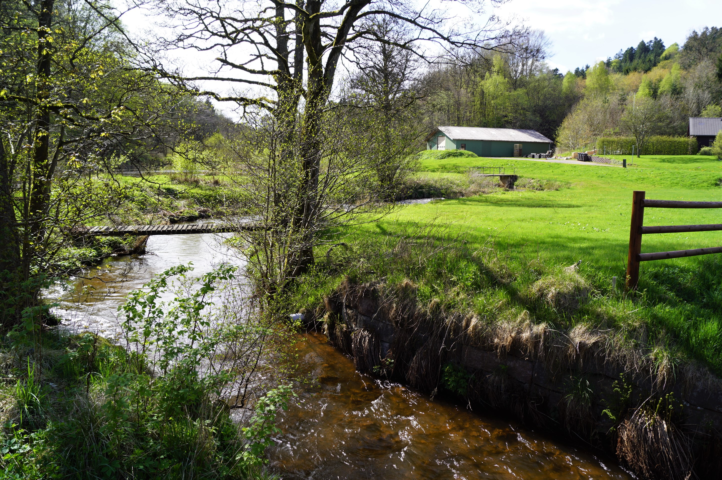 Funder Å ved Funder Station